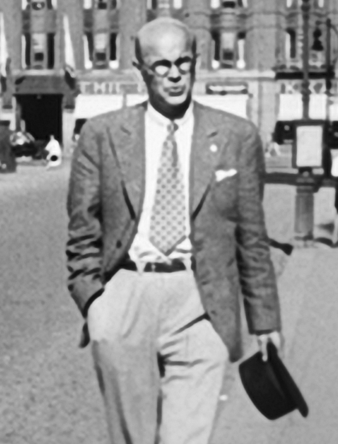 Nuori lakimies Urho Kekkonen kävelyllä Ateneumin kulmalla 30-luvun alussa.